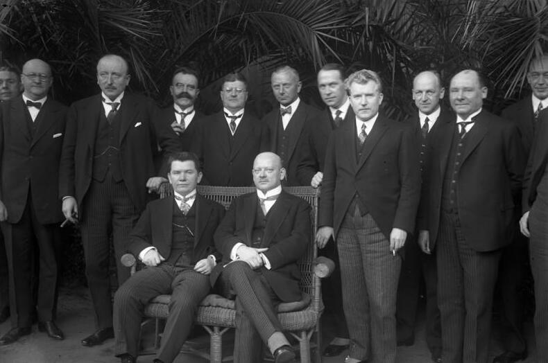 Der deutsche Reichsaussenminister Dr. Stresemann gestorben! Aus dem Wirken des Reichsaussenministers Dr. Stresemann! Reichsaussenminister Dr. Stresemann und der litauische Diktator Prof. Woldemaras während politischer Verhandlungen in Berlin.